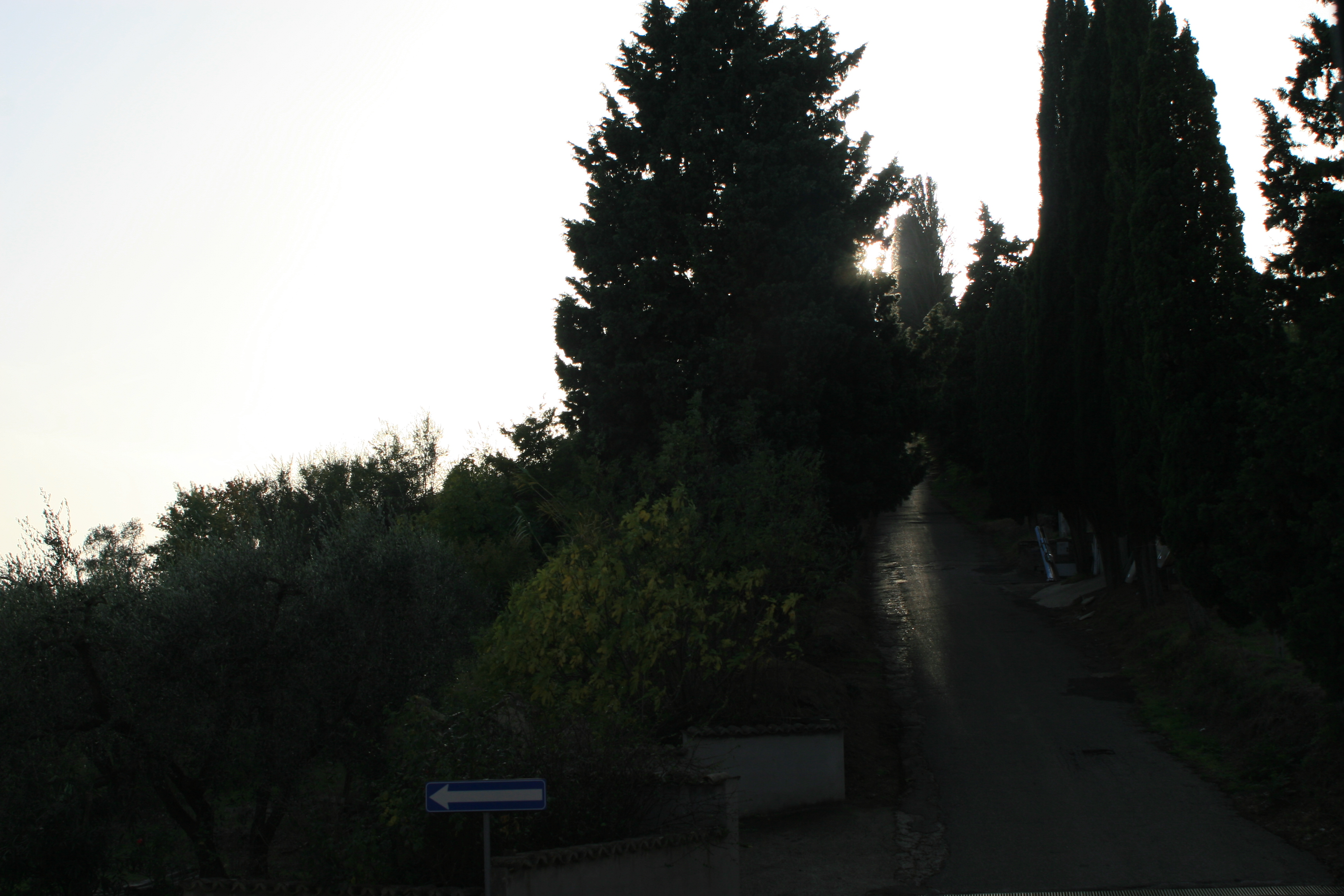 Cipressi a Castel Cellesi